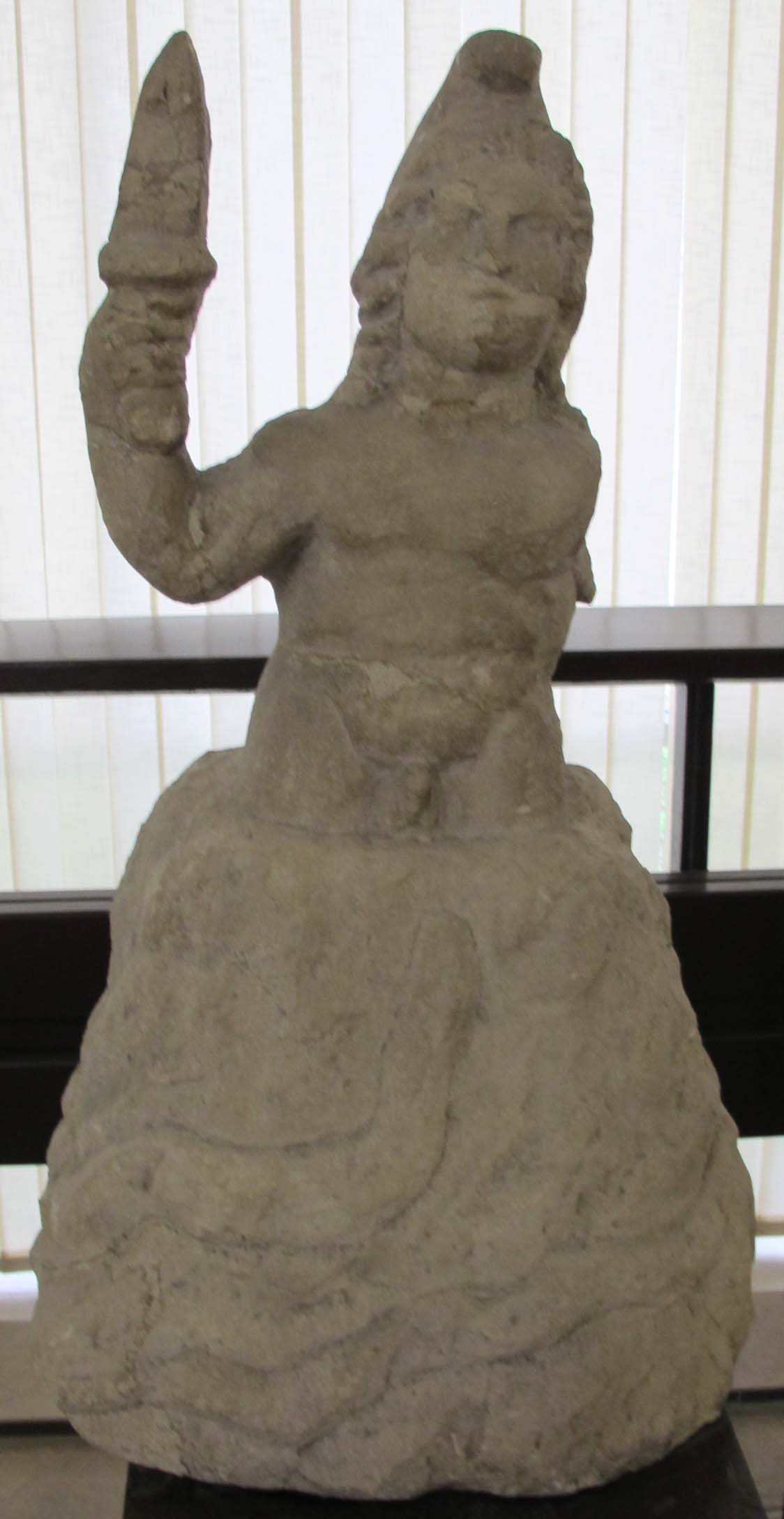 Apulum, statua di mitra petrogenito, II-III sec